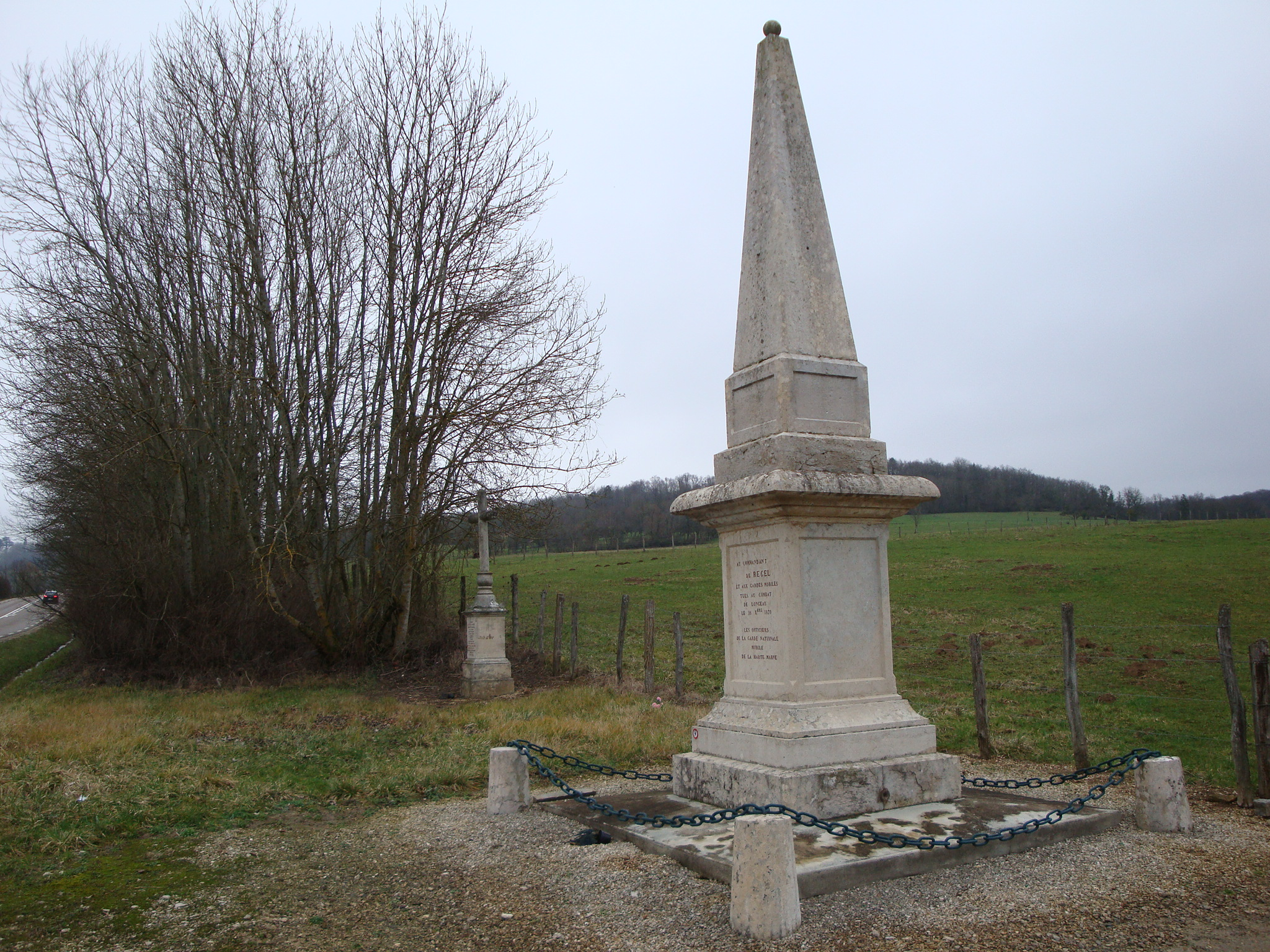 Les deux monuments du Combat de Longeau